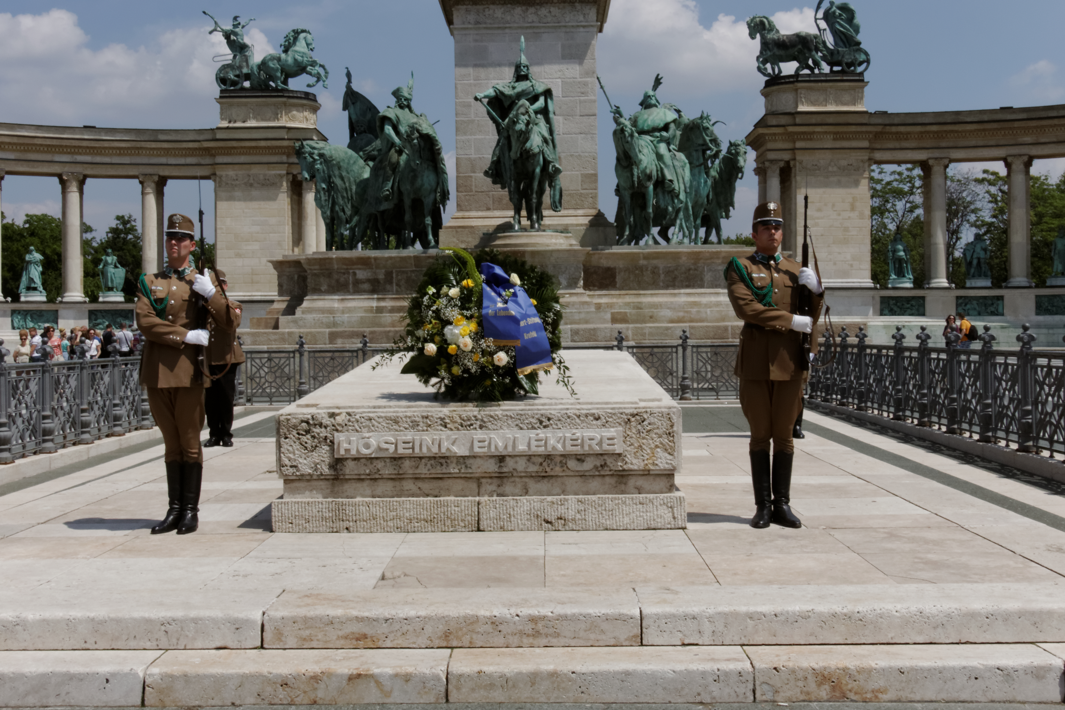 Budapest Heldenplatz nach Kranzniederlegung